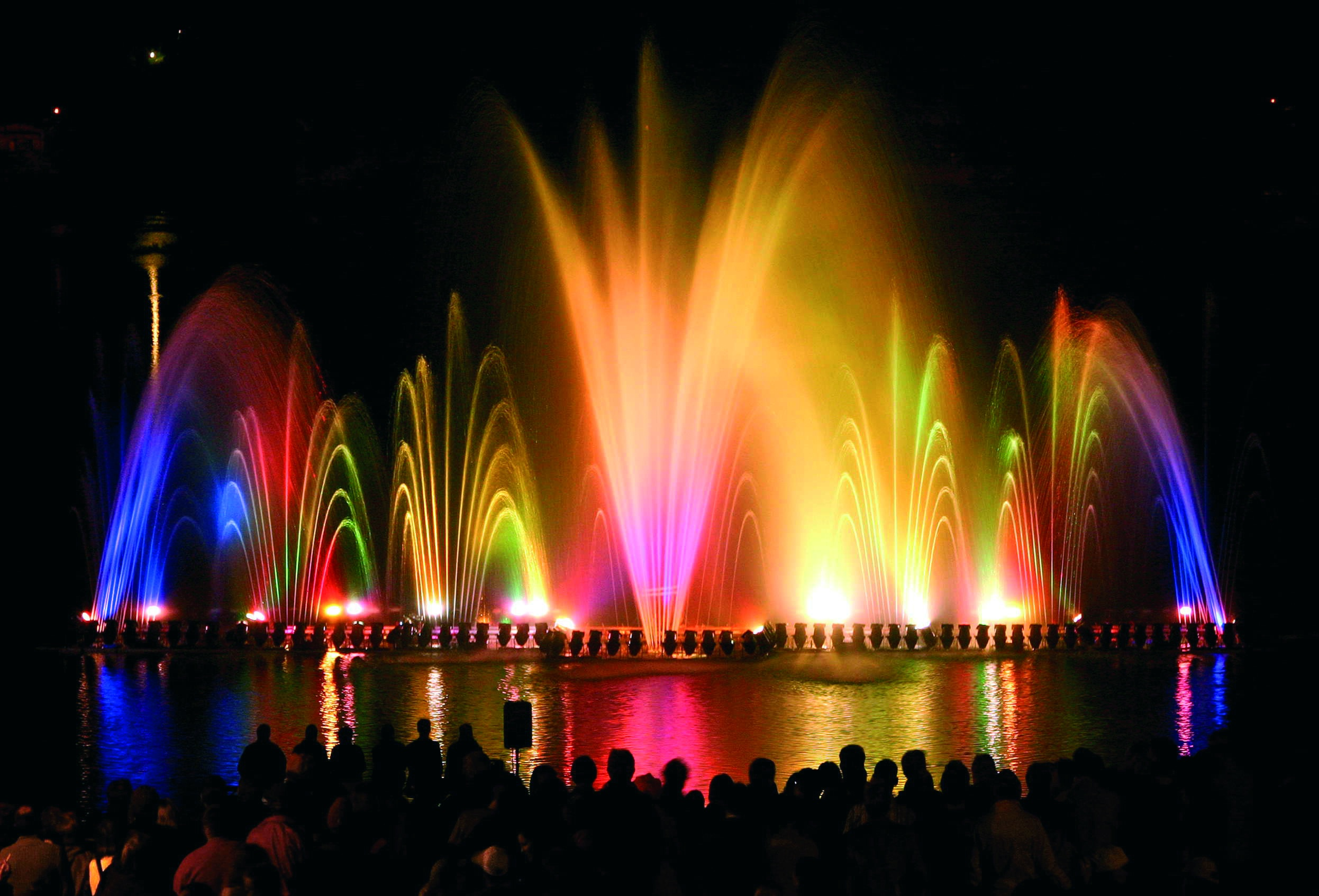 multimediales Wasserspiel